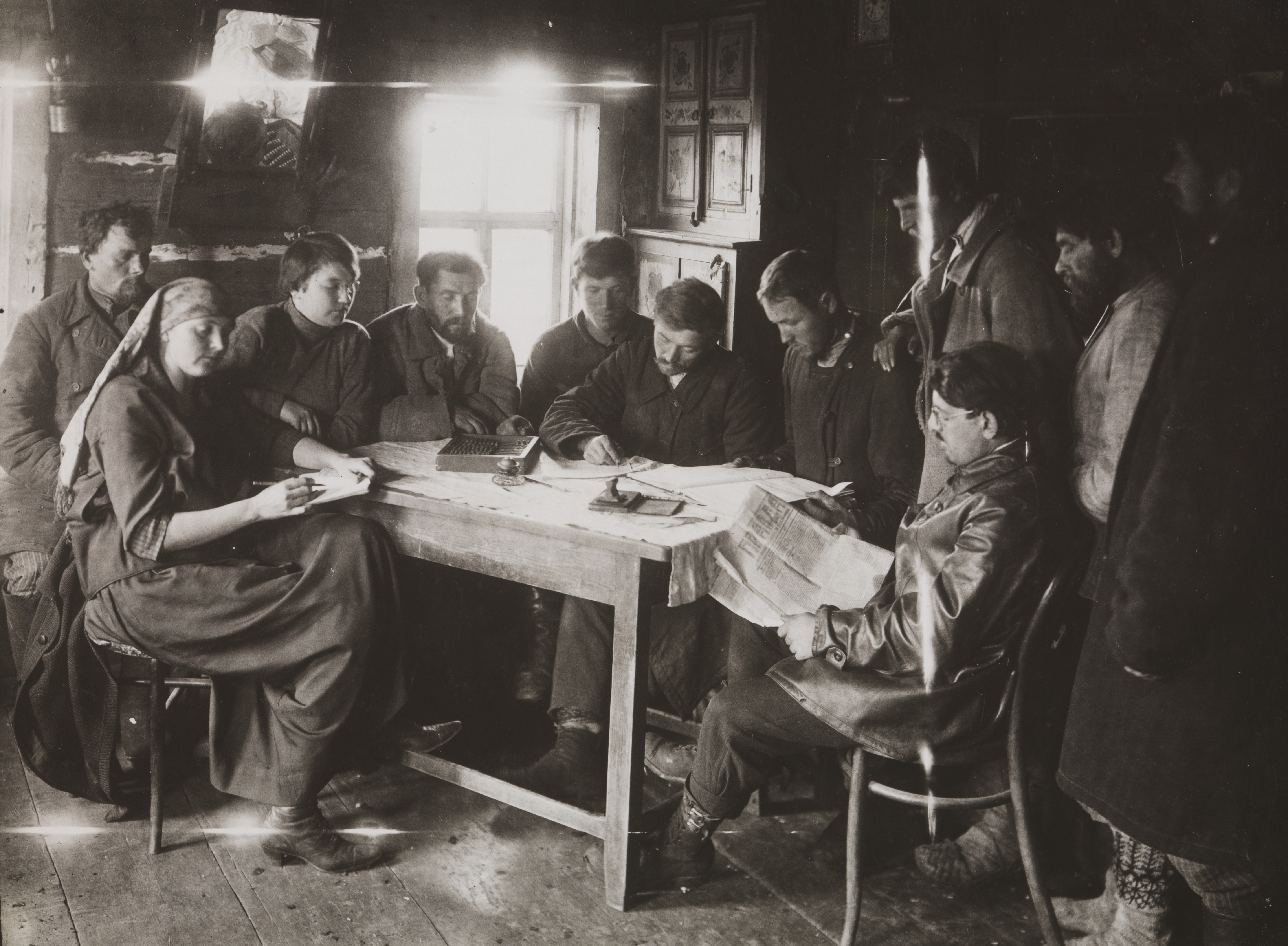 Et møte mellom representanter fra landsbyen Nova Sjemjejki, i nærheten av Samara (Kujbysjev), og kvekeren miss Strong. De skriver lister over vanskeligstilte barn som skal få klær og andre gaver. Depicted person: miss Anna Louise Strong (serving as a correspondent for the American Friends Service Committee (AFSC)) Depicted place: Russland, Samara området